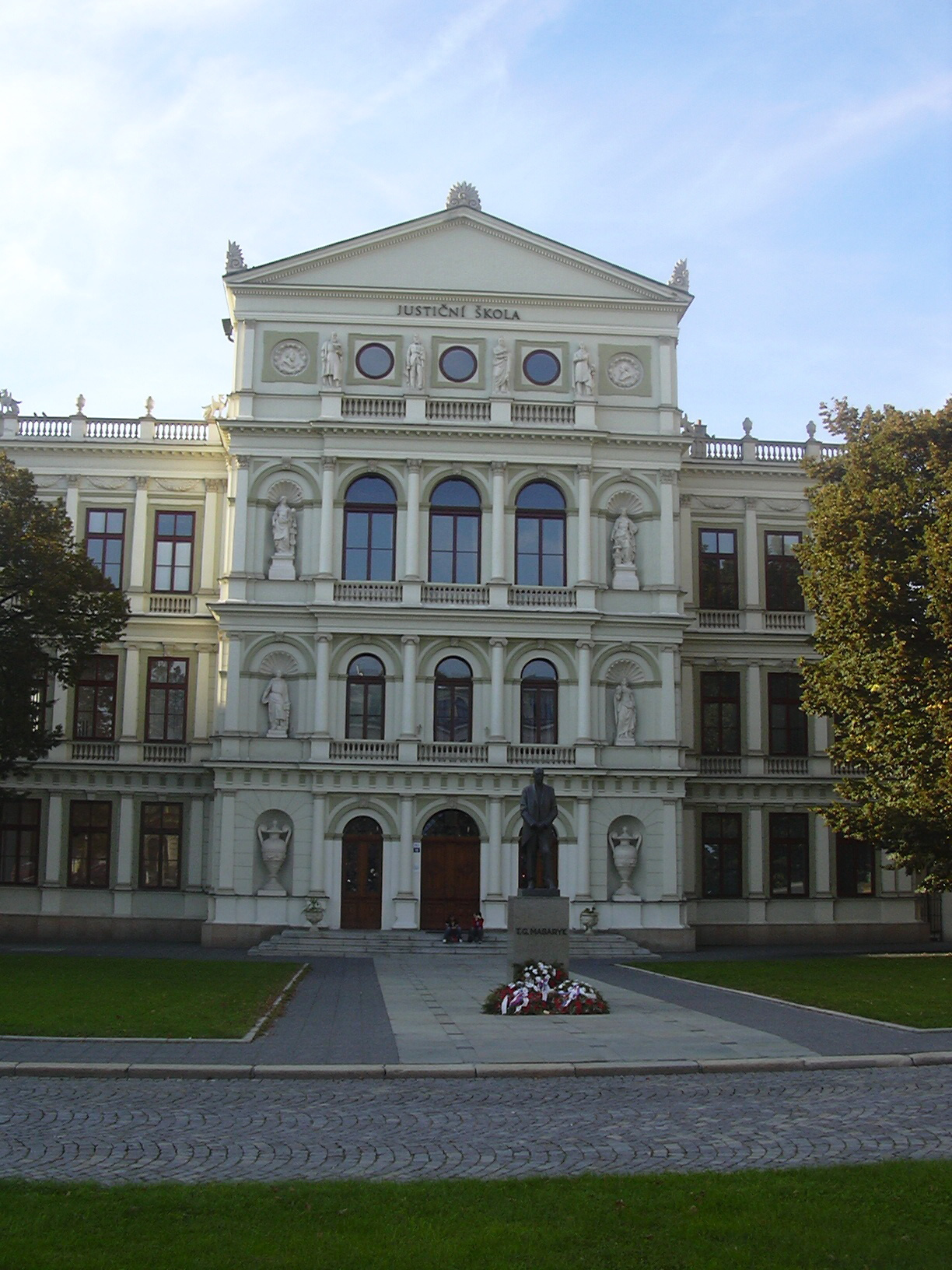 Justiční akademie Kroměříž